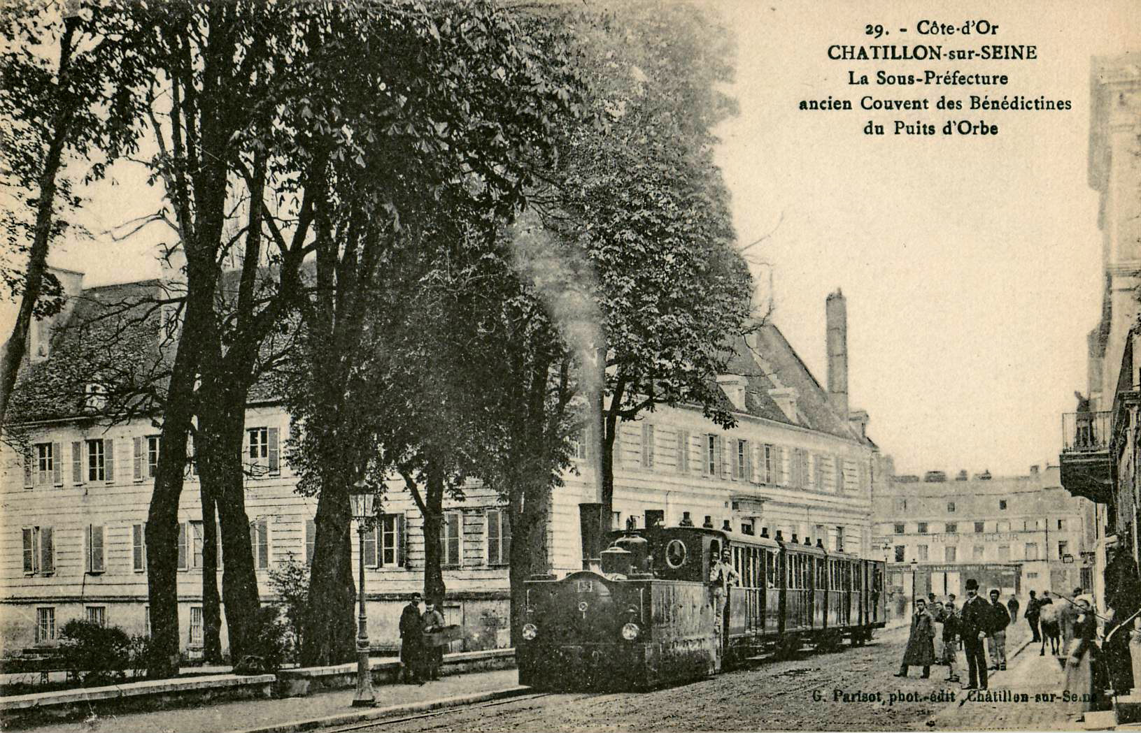 Carte postale ancienne éditée par Parisot, phot.-édit. à Châtillon-sur-SeineChâtillon-sur-Seine (Côte-d'Or) : La Sous-Préfecture, ancien couvent des bénédictines du Puits d'OrbesVue en gros plan d'une rame de la Compagnie des chemins de fer du Sud de la France (SF) (jusqu'en 1910) ou de la Régie des Tramways départementaux de Côte d'Or (1910 à 1922) - Ligne (Dijon) Aignay-le-Duc - Châtillon-sur-Seine